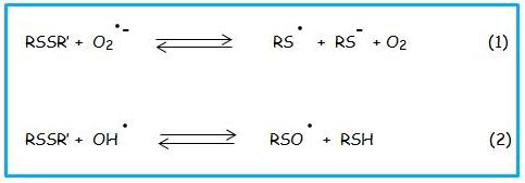 Les ponts disulfures régissent avec des radicaux libres mis en jeu lors du stress oxydant